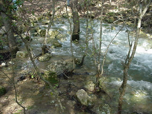 Fonts Ufanes. Campanet. Mallorca.